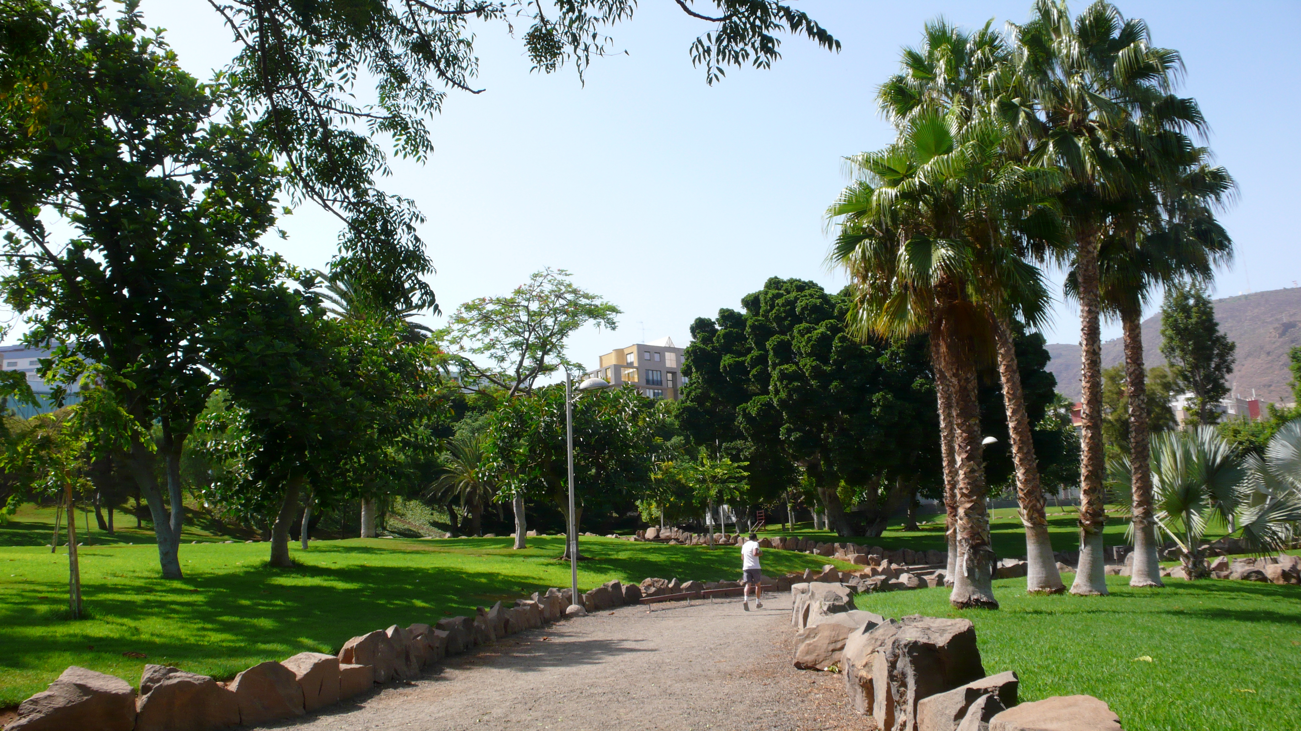 Vista de Parque de La Granja, en Santa Cruz de Tenerife